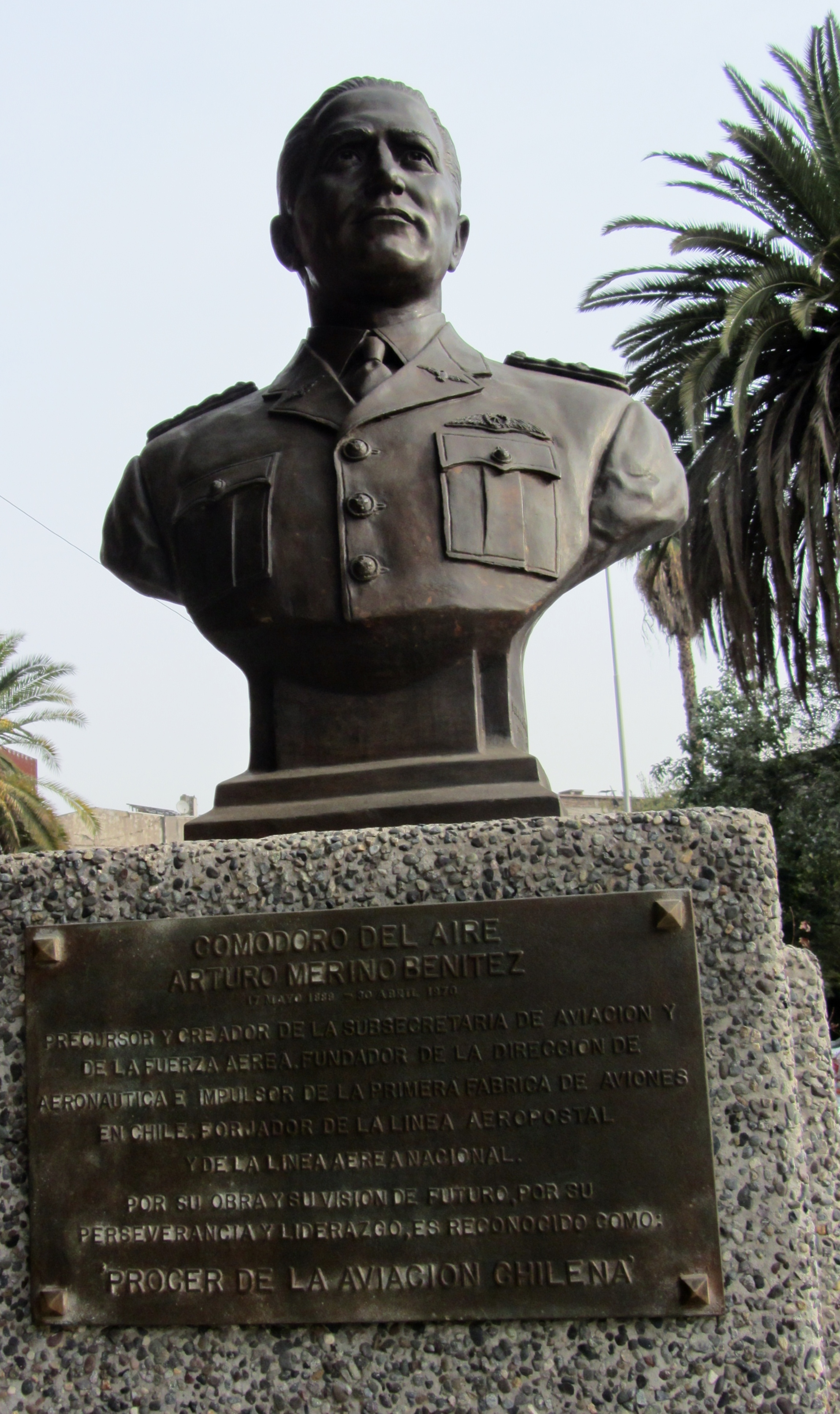 Busto del comodoro del aire Arturo Merino Benítez a la entrada al edificio Diego Portales (torre Villavicencio), cuando este aún pertenecía al Ministerio de Defensa de Chile